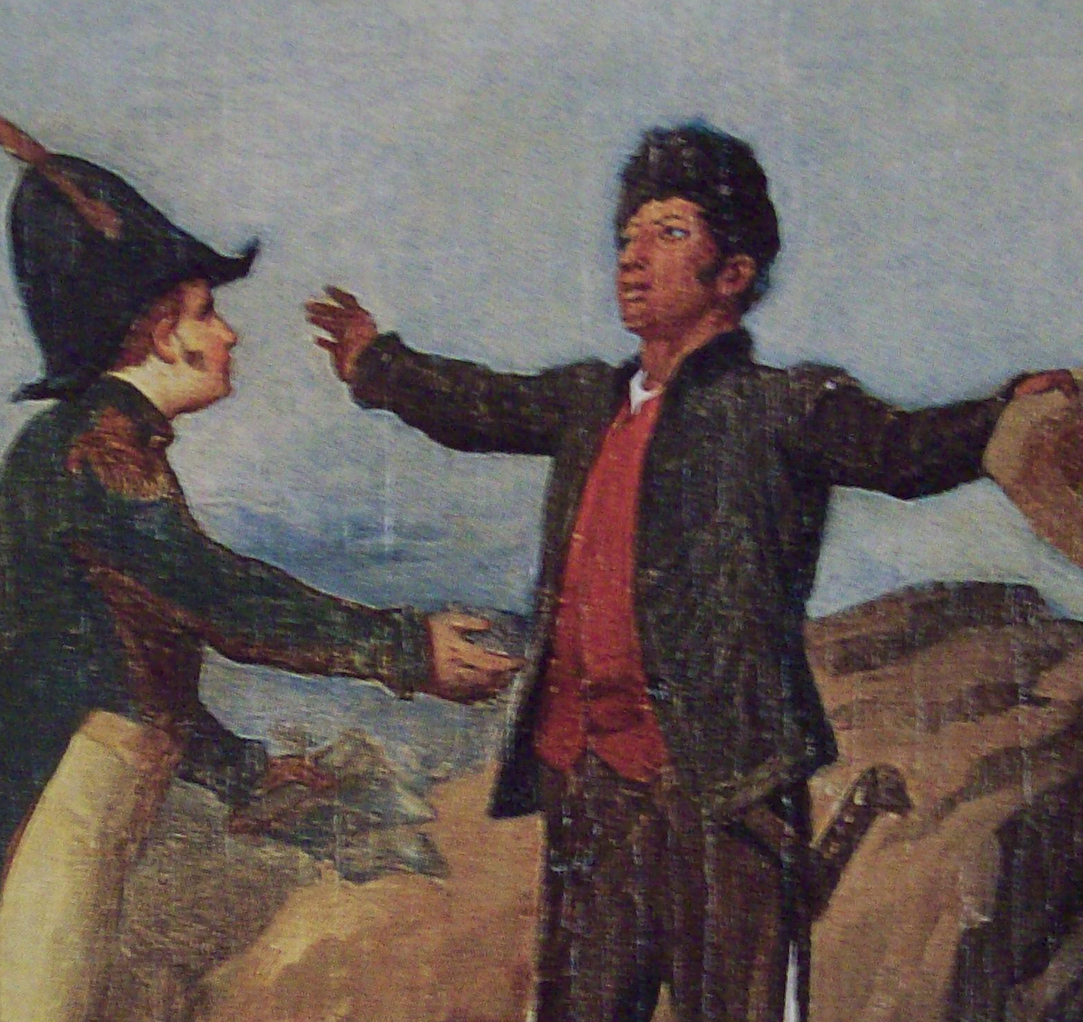 Abrazo de Acatempan (detalle). Óleo sobre tela de 1870, Román Sagredo, Museo Nacional de Historia, INAH, México.